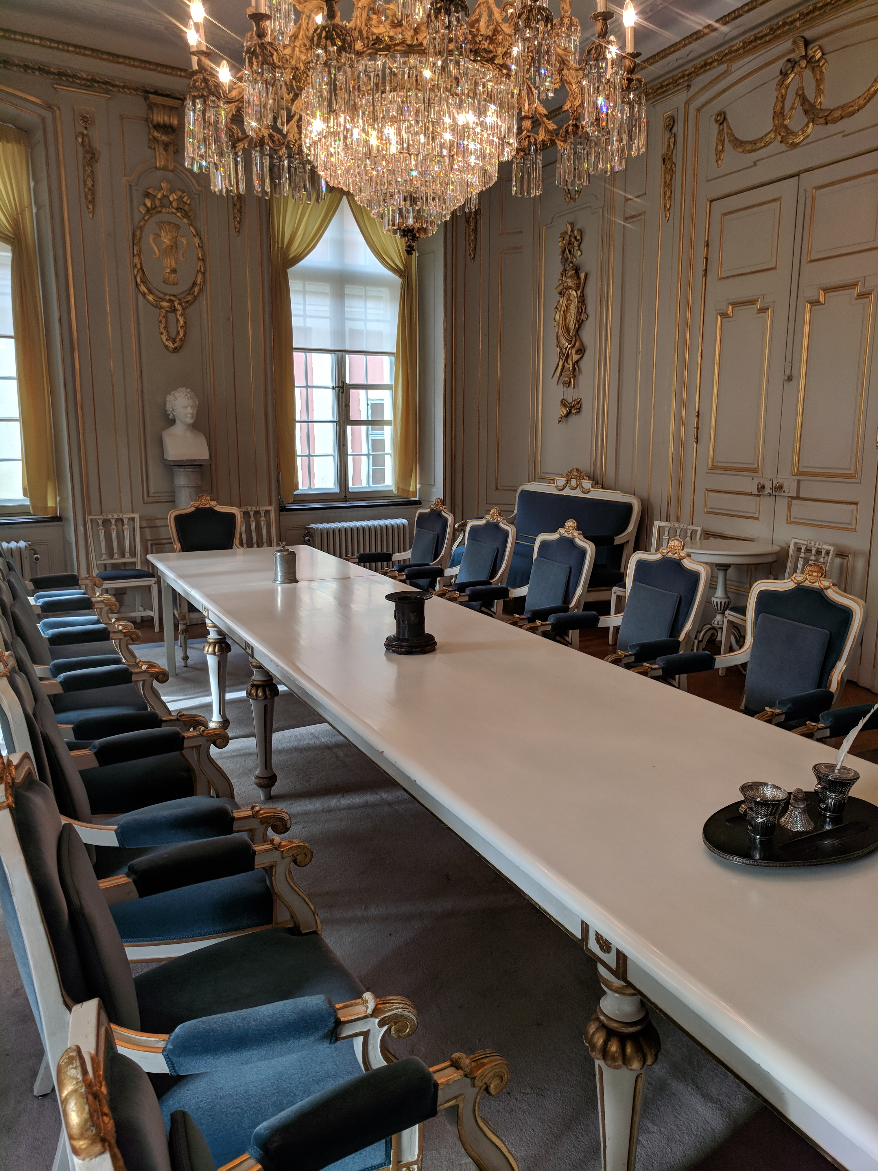 Svenska akademin